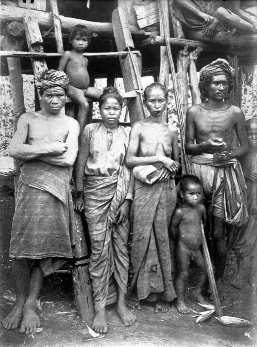 Repronegatief. Inwoners uit Laboenti op het eiland Moena, Zuidoost-Celebes